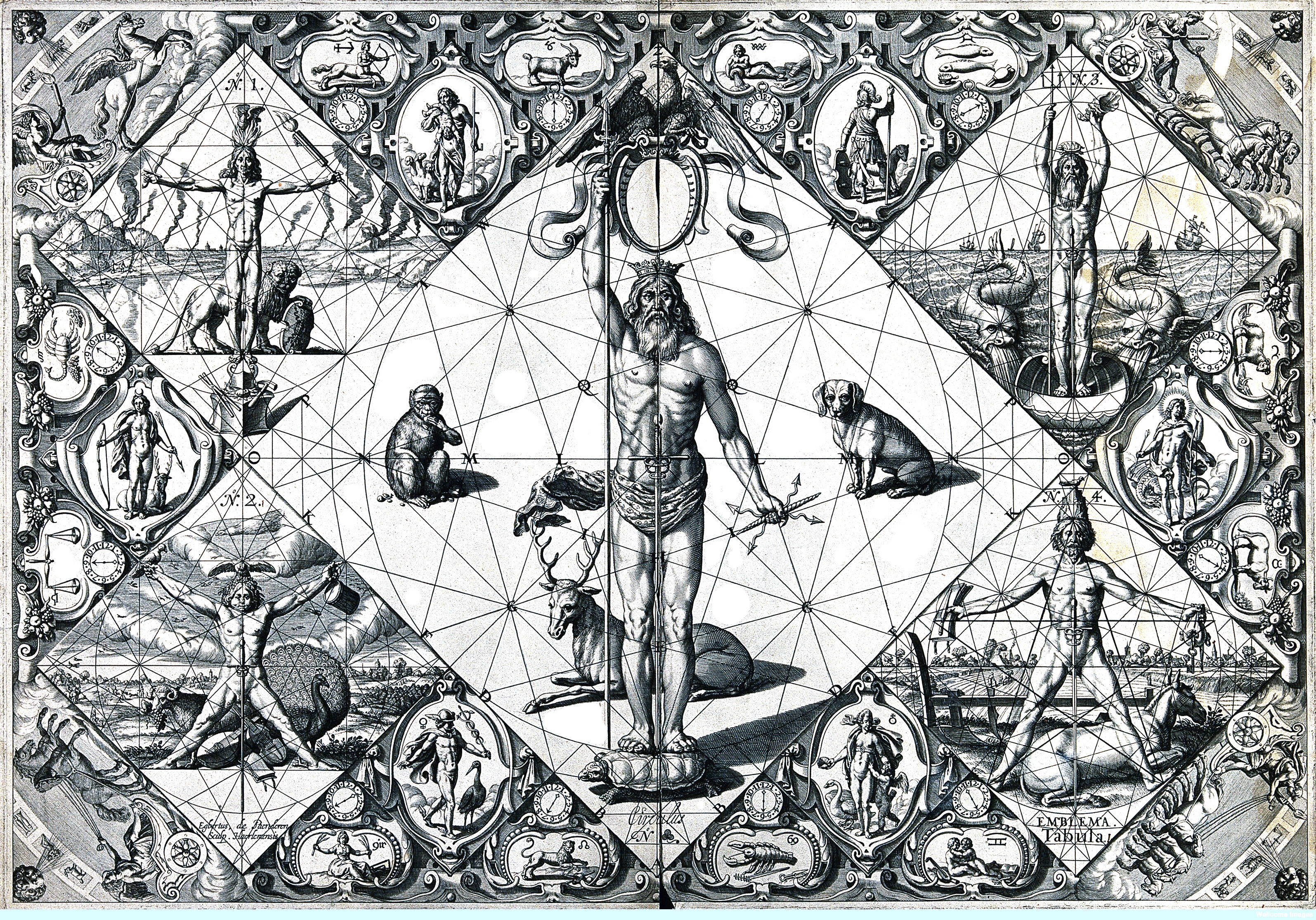 Human proportions established through mythological figures. By Girard Thibault. Человеческие пропорции через мифологические фигуры. Гравюра из книги Académie де l'Espée (1628) Жирара Тибо (Girard Thibault), посвященная фектованию. Самое большое по размерам издание легендарных Эльзевиров. На 1914 год находилась в книжном собрании И. Д. Орлова